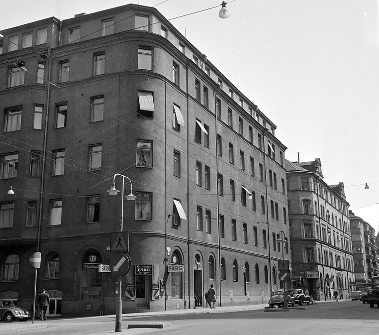 Artillerigatan vid Linnégatan 1961, Östermalm.